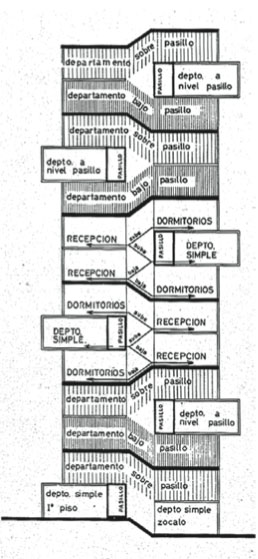 Corte vertical edificio Remodelación República, para mostrar su distribución interna